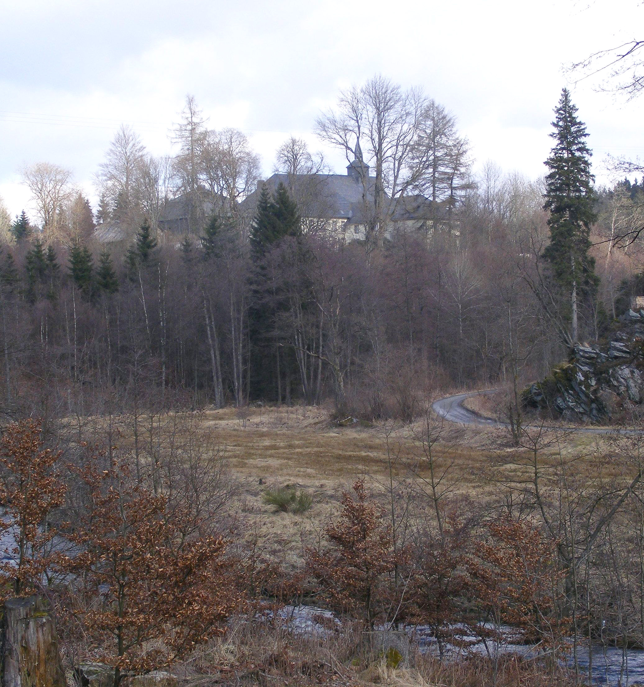 Kloster Reichenstein, Monschau, Eifel, Germany